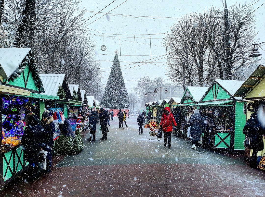 Хмельницький Різдвяний Ярмарок під час сильного снігопаду о дванадцятій годині дня 28 грудня. Щорічний ярмарок розкинувся на площі перед кінотеатром ім.Шевченка взвдовж пішохідної частини вулиці Проскурівська. Світлина - Василя Камінського))